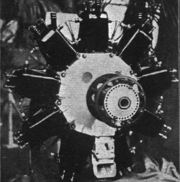 Motore Fiat A.18 da 300 Hp